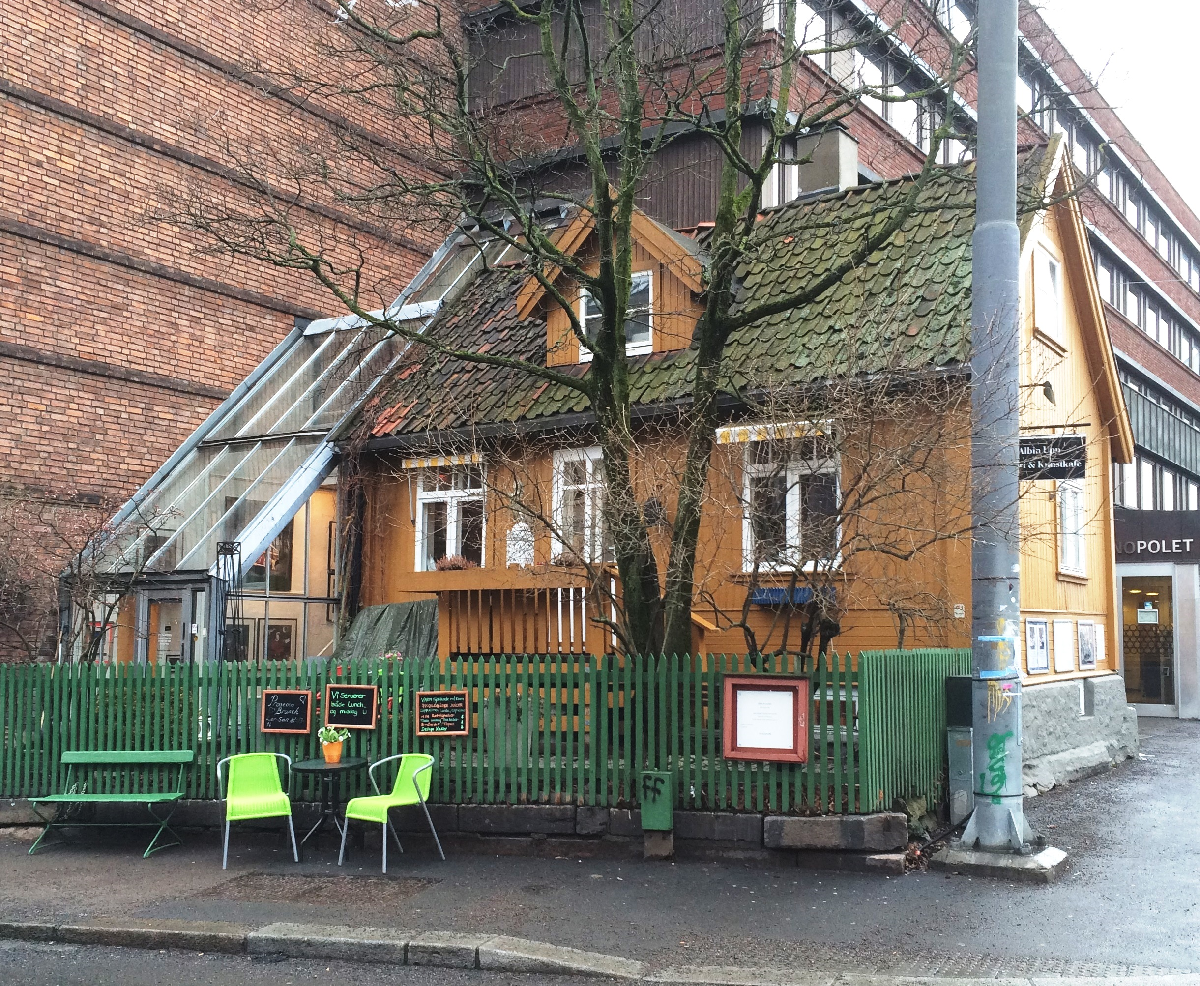 Briskebyveien 42. Trebygning, opprinnelig boligeiendom fra 1800-tallet, nå Albin Upp.